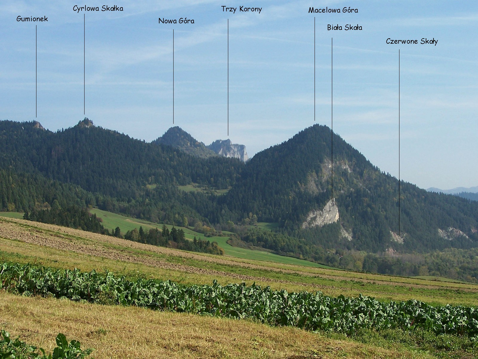 Pieniny, widok z okolic skrzyżowania drogi do Niedzicy i Sromowiec Niżnych